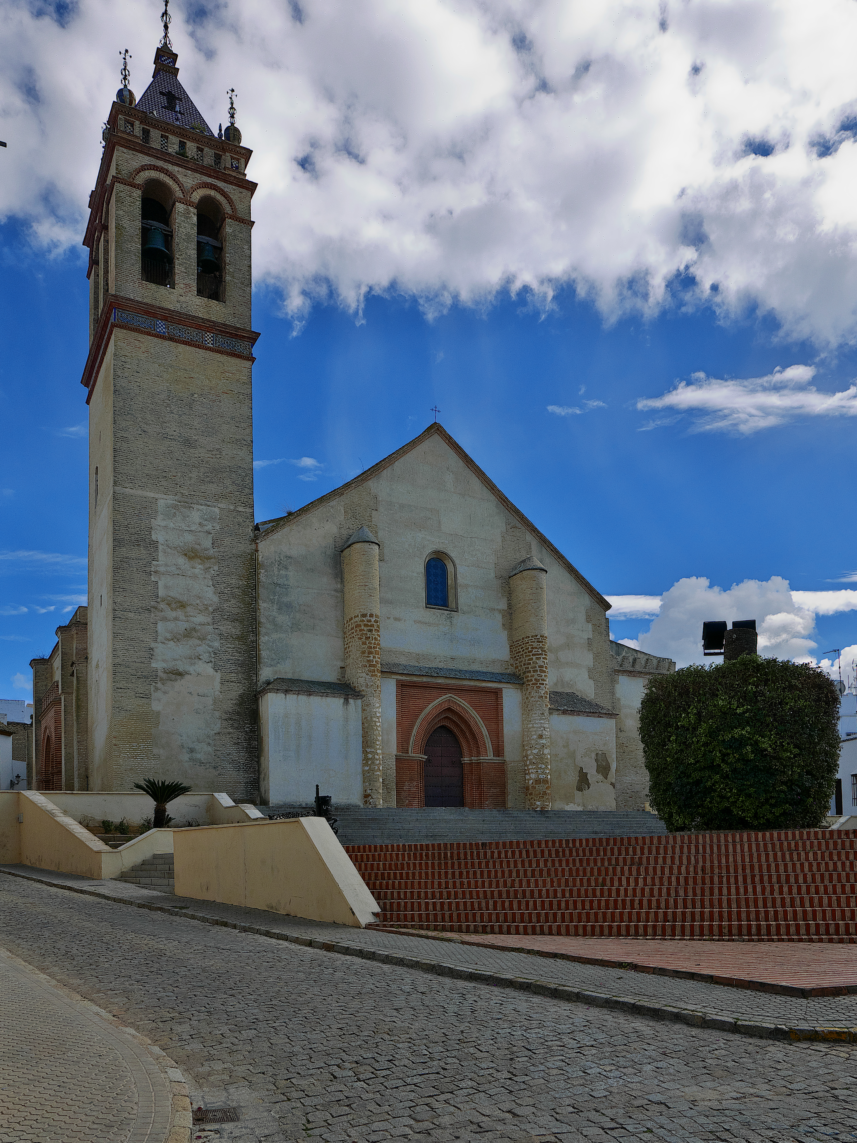 Fachada de los pies de la iglesia.